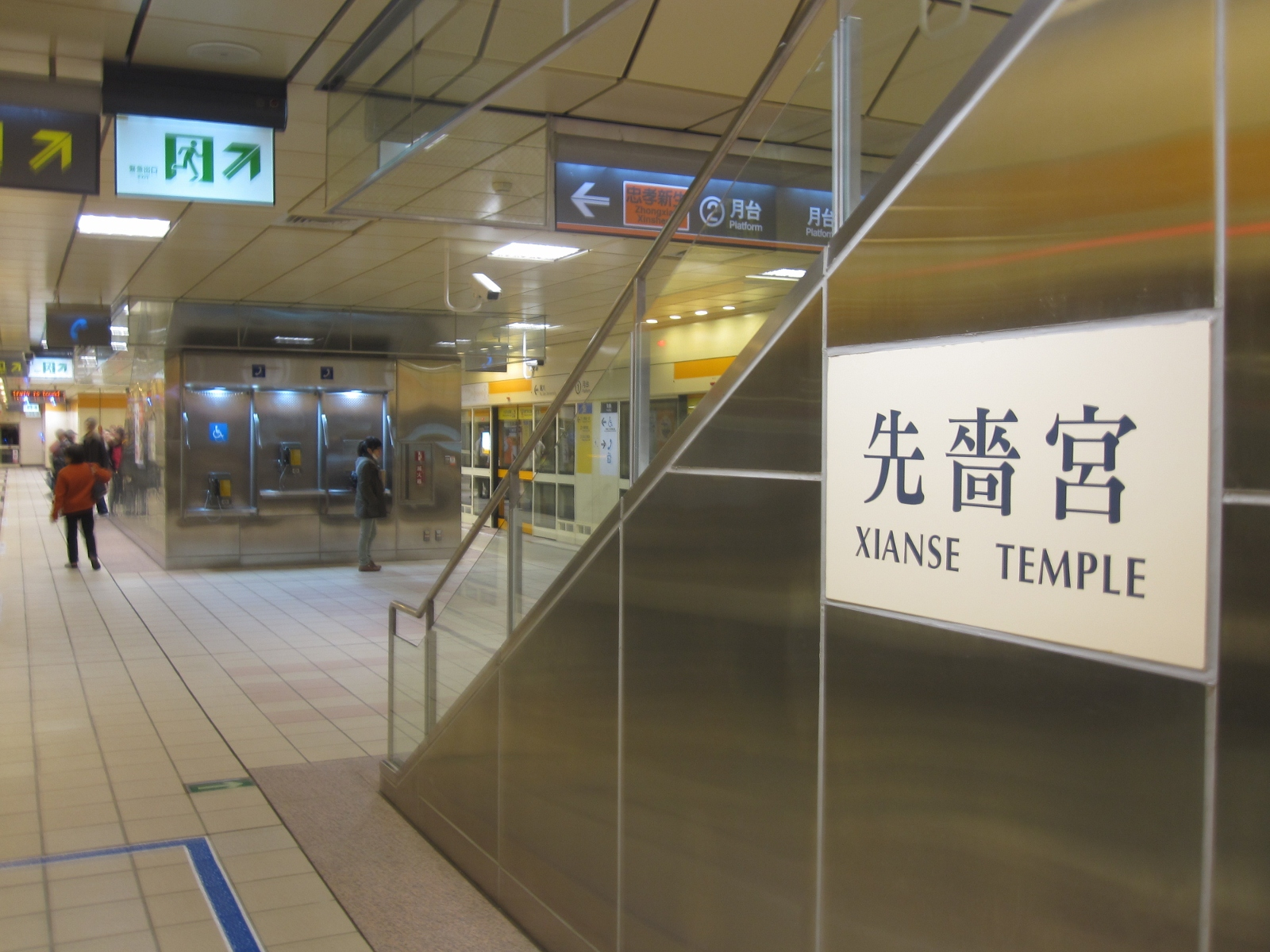 先嗇宮站月台層